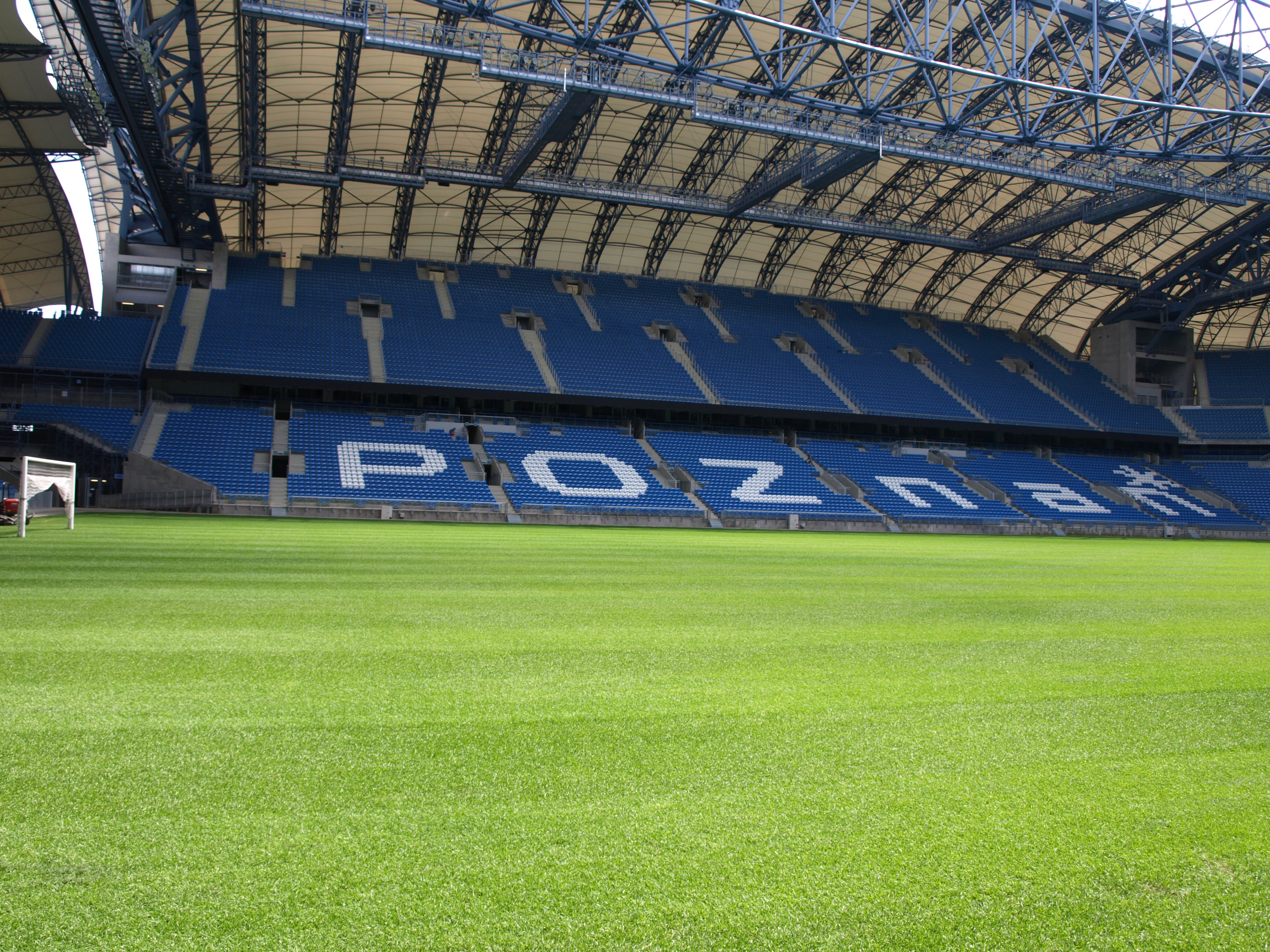 Stadion Lecha Poznan